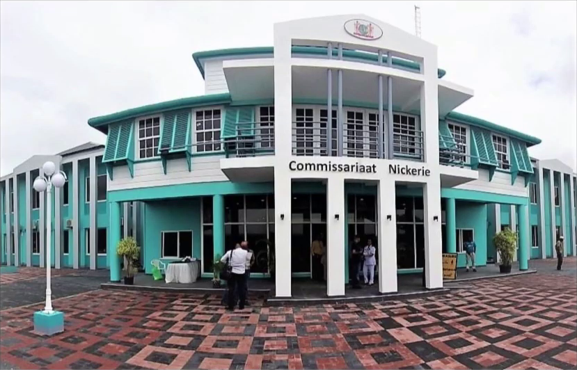 Districts Commissariaat Nickerie, nieuw gebouw uit 2020